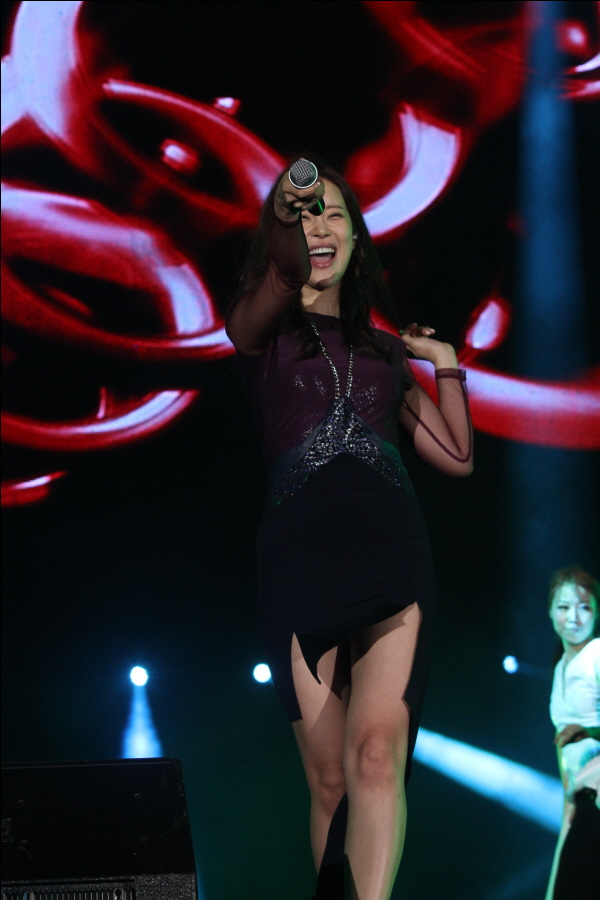 2012년 7월 19일 여수 엑스포 팝 페스티벌에서 백지영.